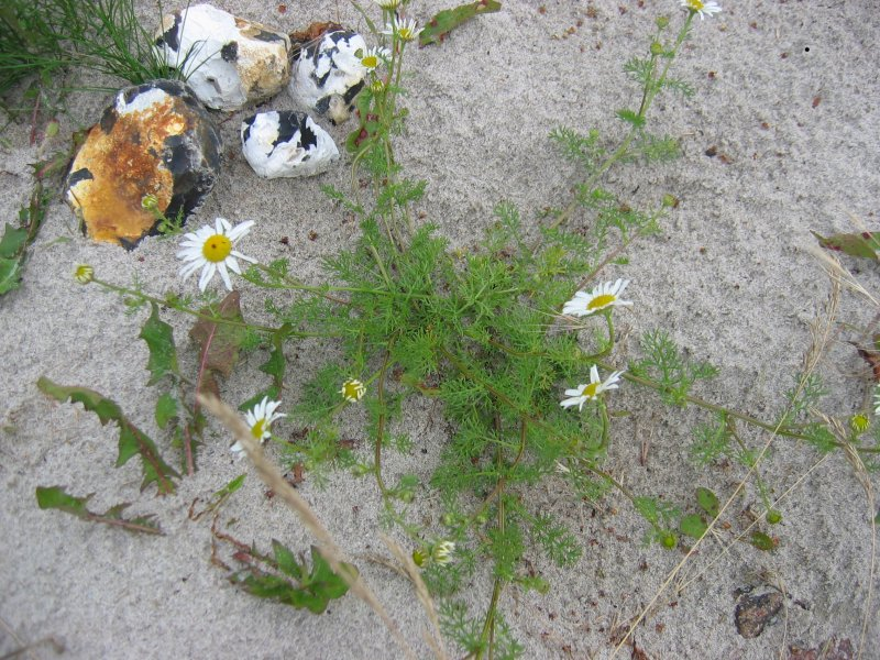 Echte Strandkamille Tripleurospermum maritimum, Habitus